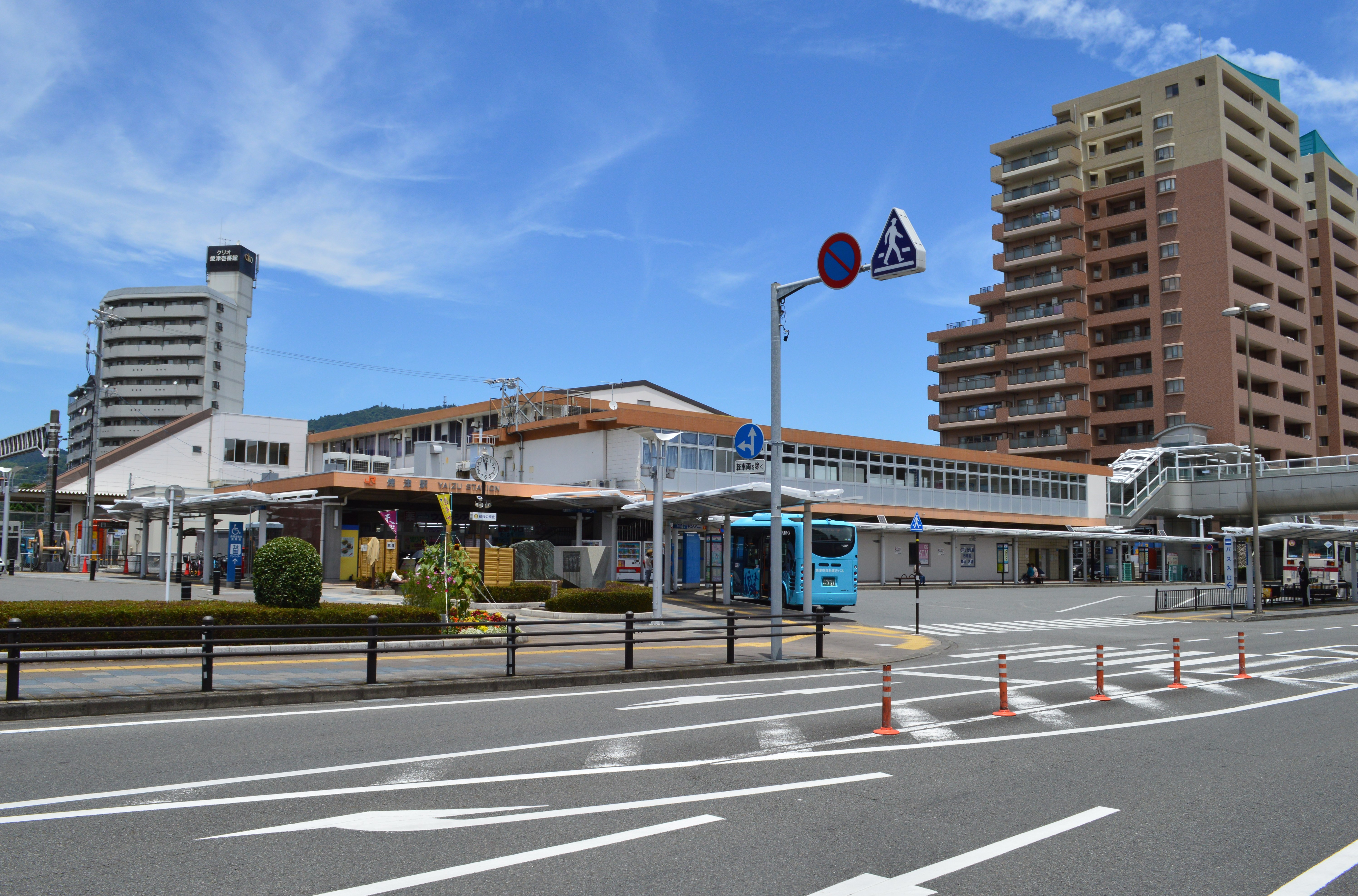 焼津駅 南口全景